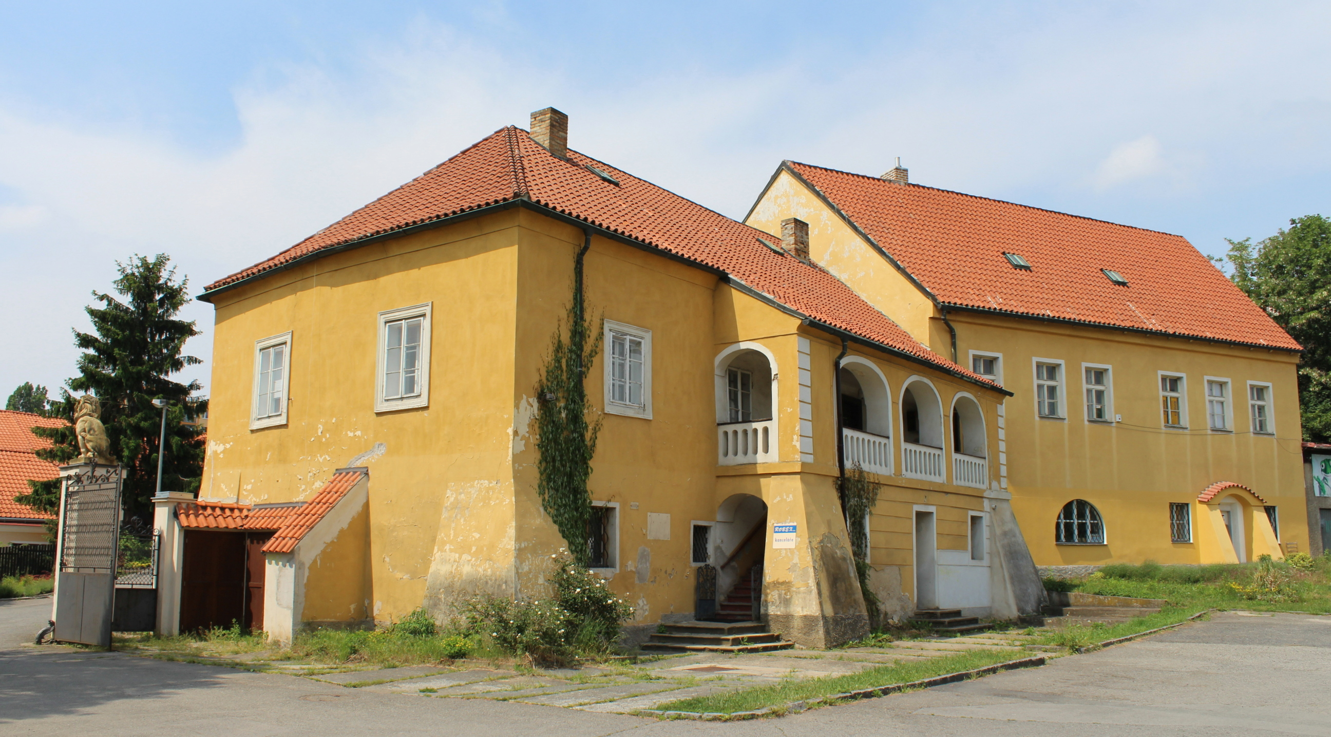 Práčský zámeček, Praha 10-Záběhlice